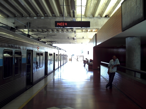 MetroRec - Estação Terminal Camaragibe